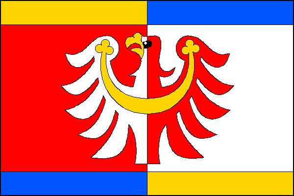 Vlajka obce Petrohrad